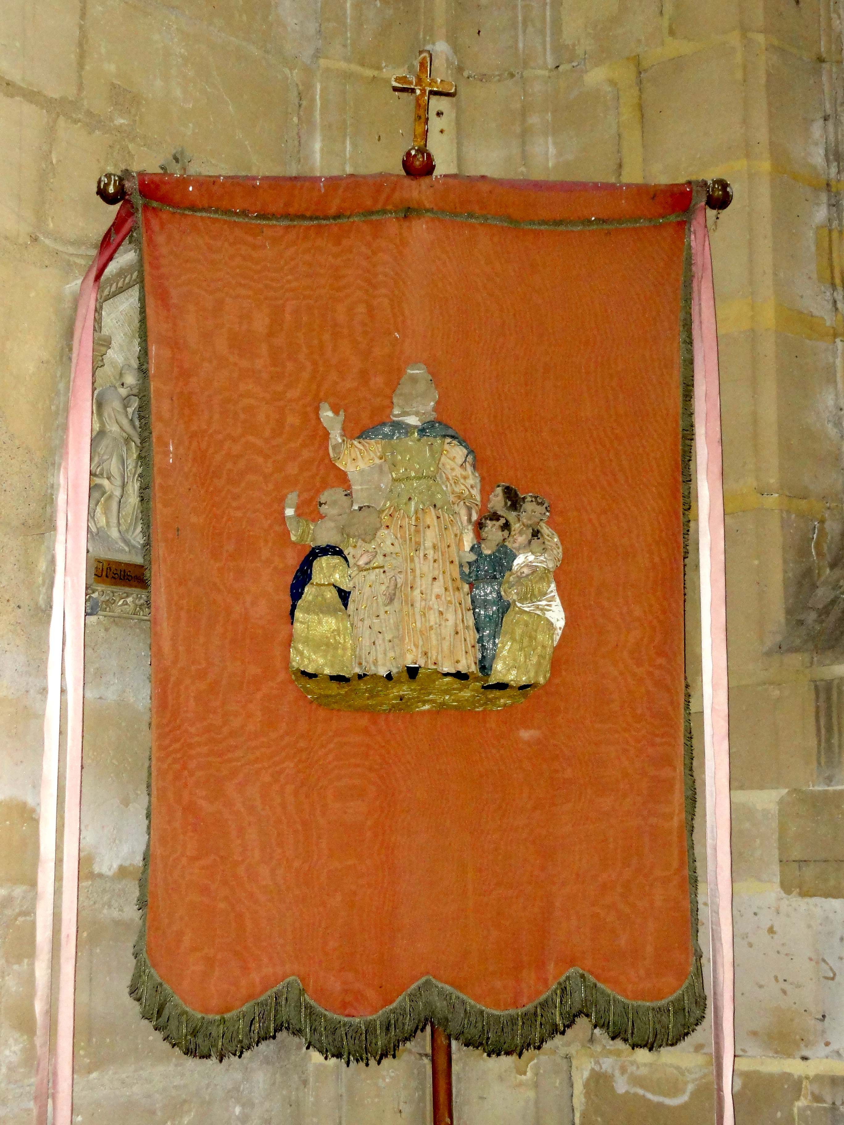 Mobilier de l'église (voir titre).